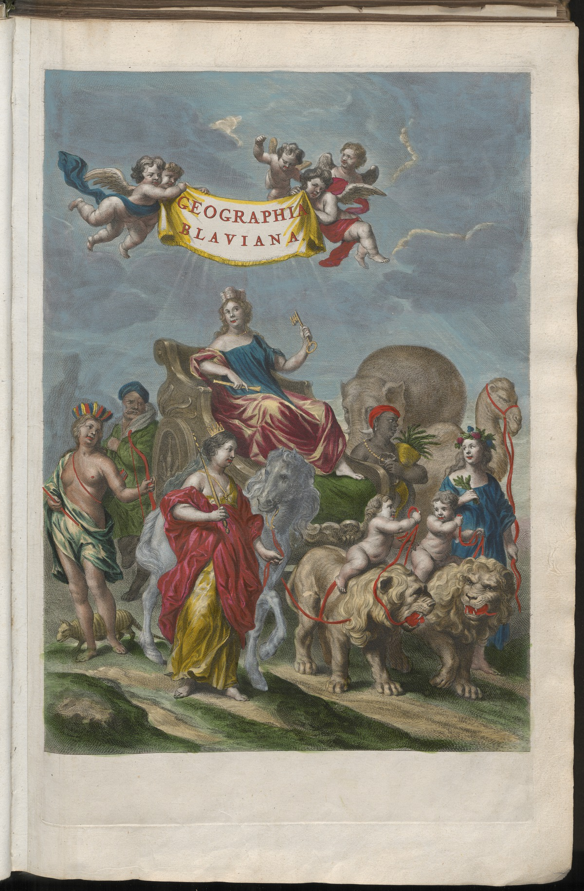 Grooten atlas illustratie 'Geographia Blaviana'